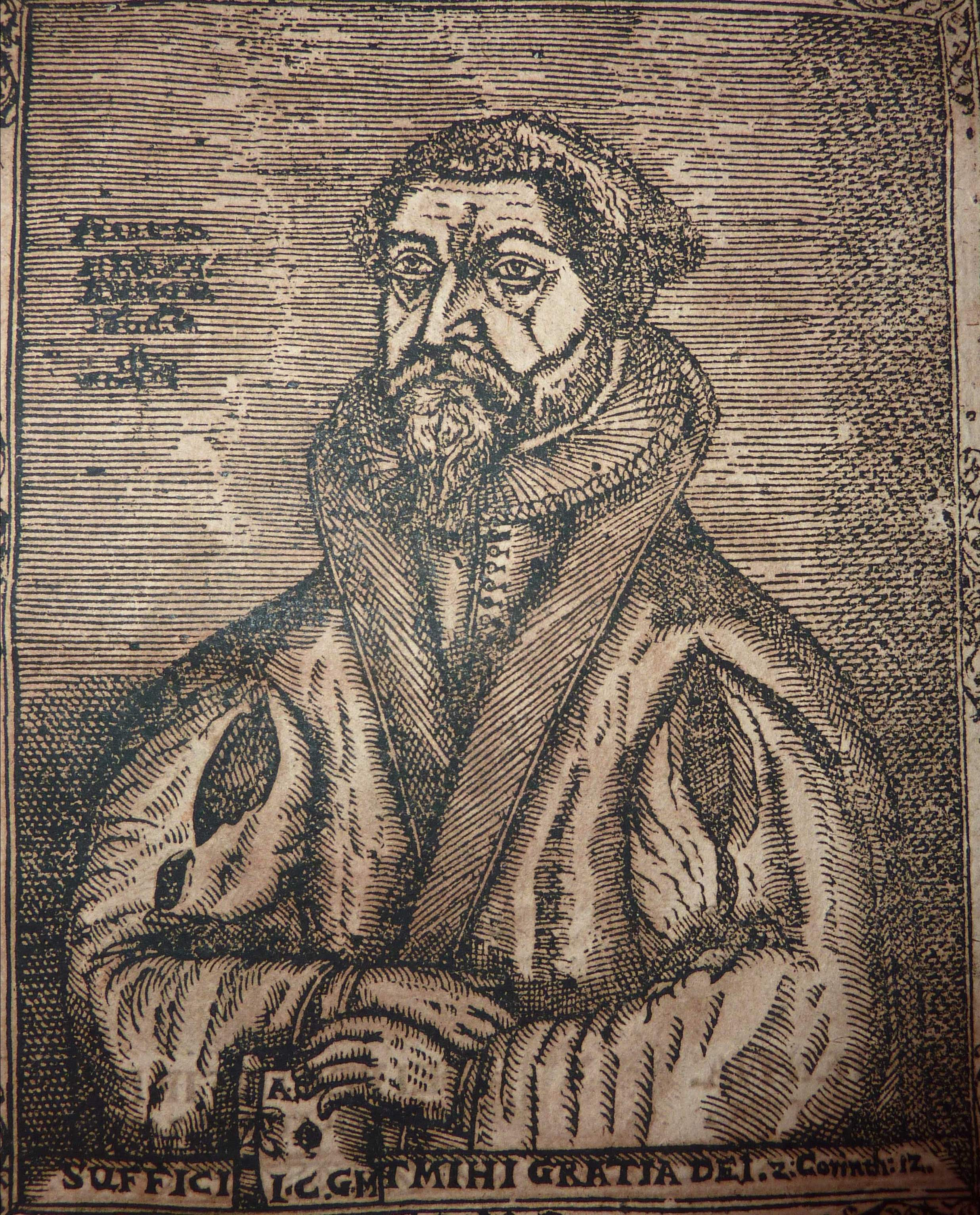 Johann Coler, Porträt aus Oeconomia oder Haußbuch, Wittenberg 1619